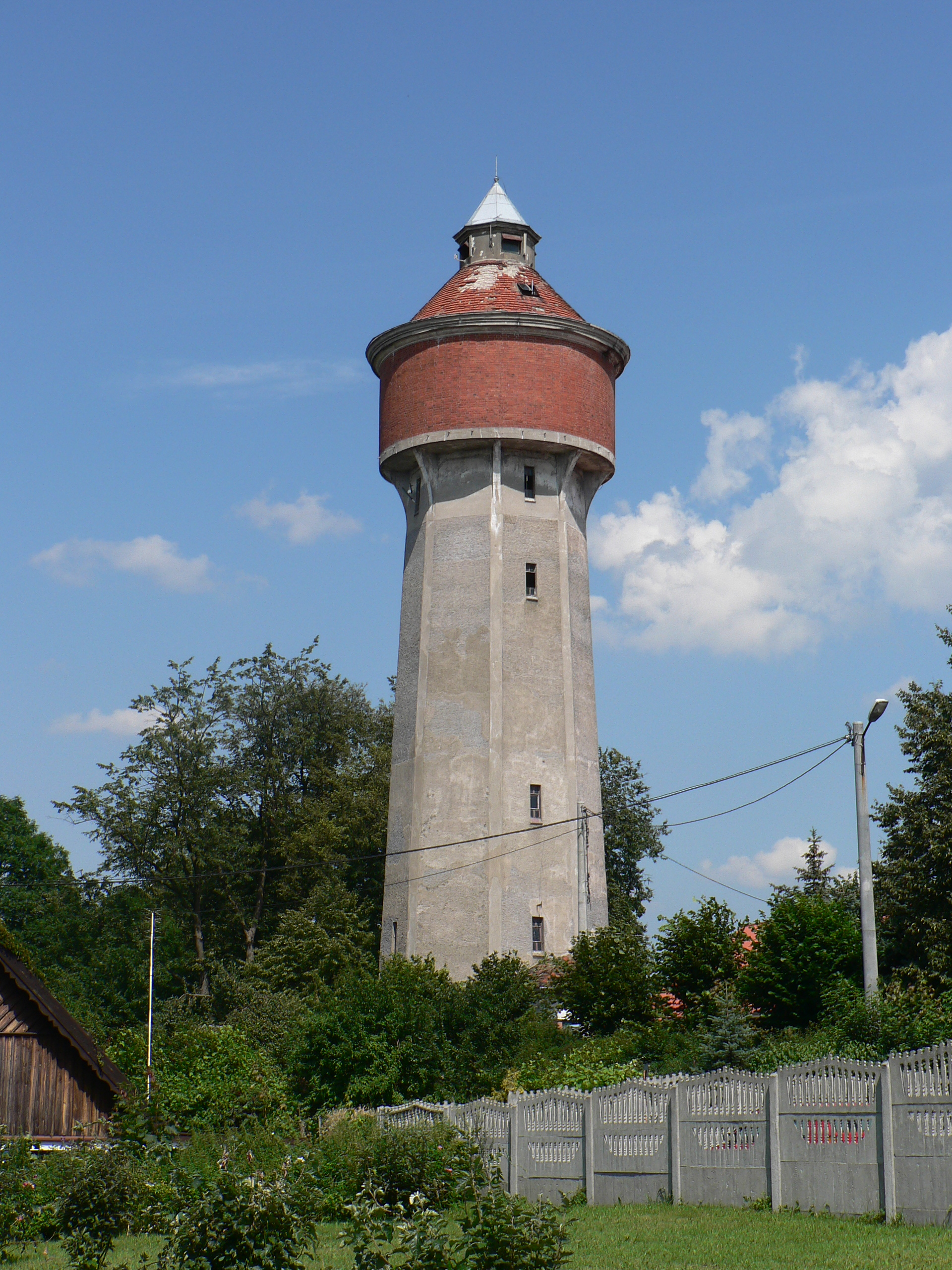 Komunalna wieża ciśnień w Olsztynku